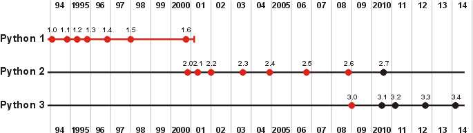 Línea Cronológica de Python